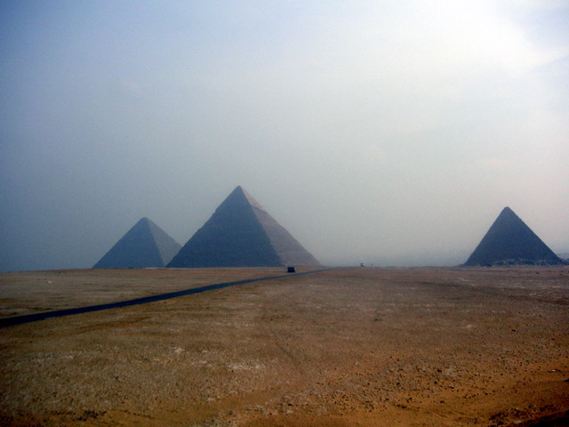 Pirámides de Keops, Kefren y Micerinos. El Cairo.